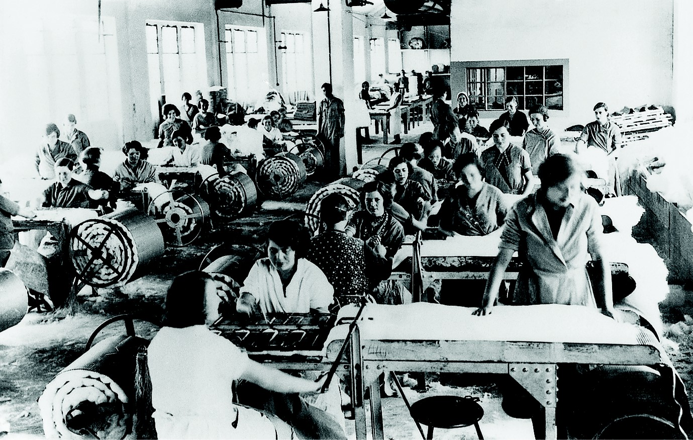 Herstellung von Glaswolle in den 1930er Jahren